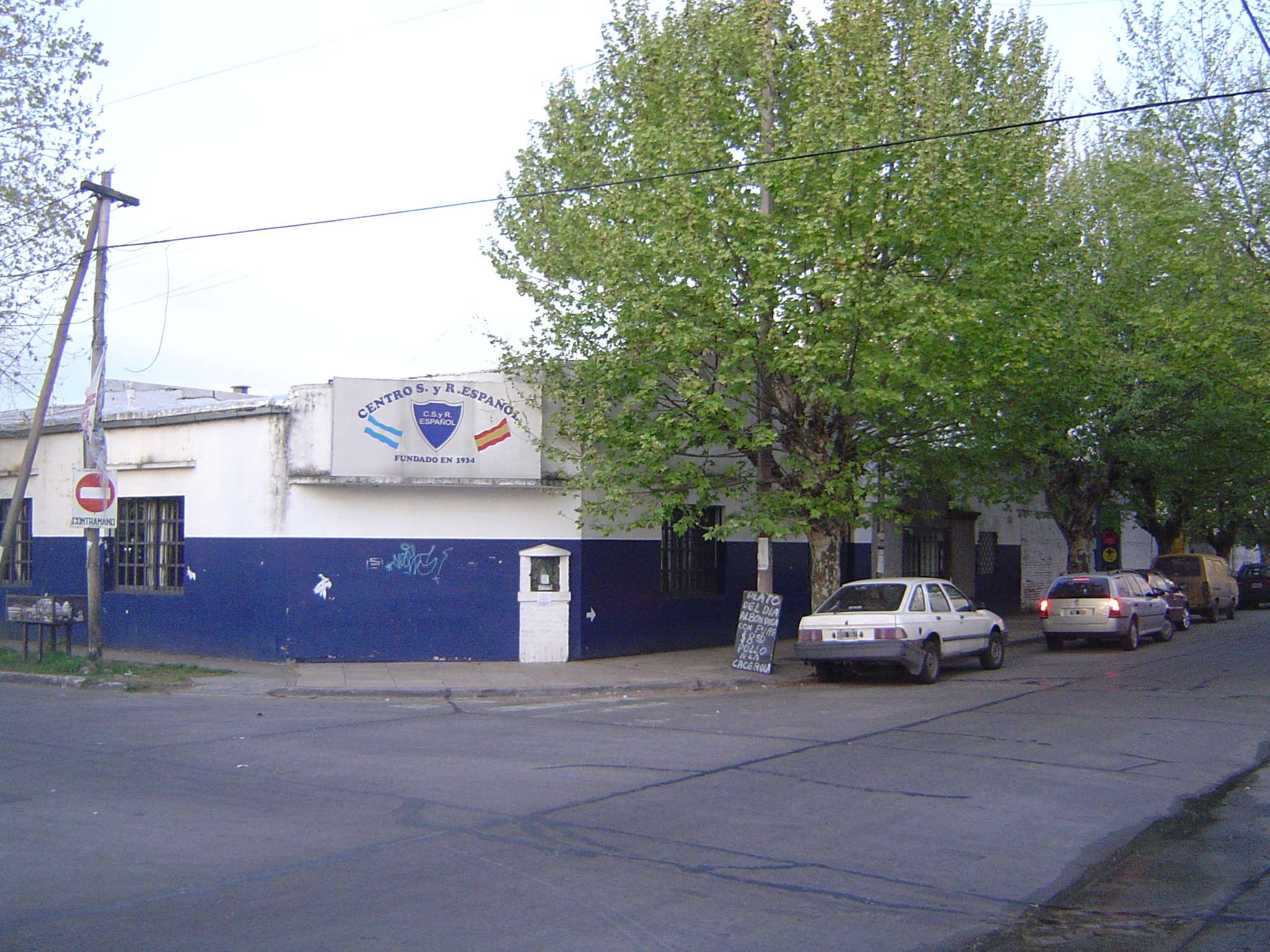 Sede del Club Social y Recreativo Español, de Villa Sarmiento, Provincia de Buenos Aires